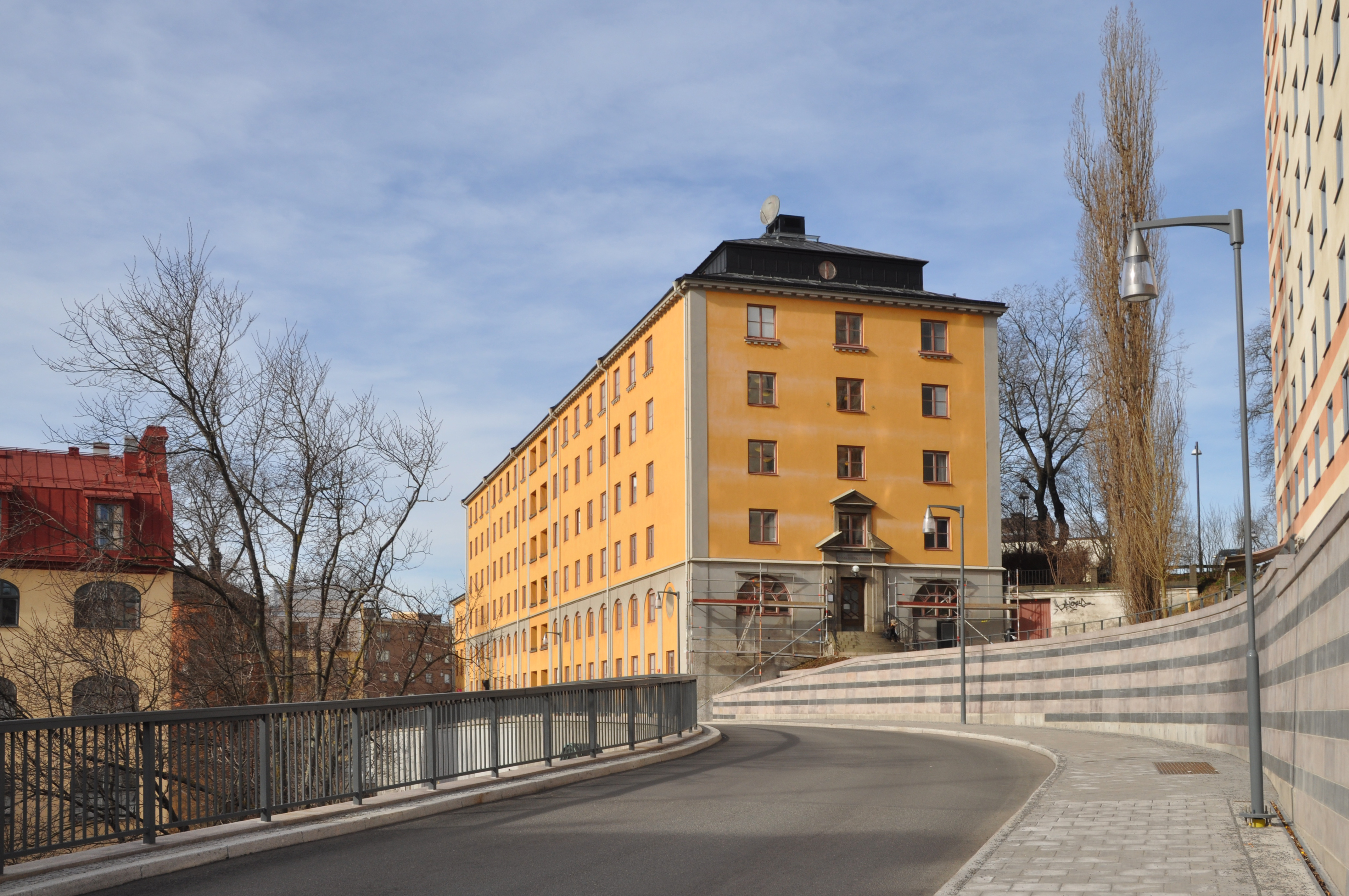 Sabbatsberg 18, Crafoords väg 12, Hälsobrunnsgatan 6-10, Nybyggnadsår 1925, FSK Stockholms Stads Fastighetskontor (Byggherre) Gustaf Ameén (Arkitekt) Waldemar Johansson (Arkitekt) Tidigare Röda korsets sjuksköterskehem